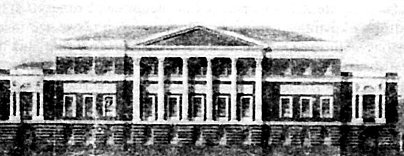 Здание Государственного института физиотерапии